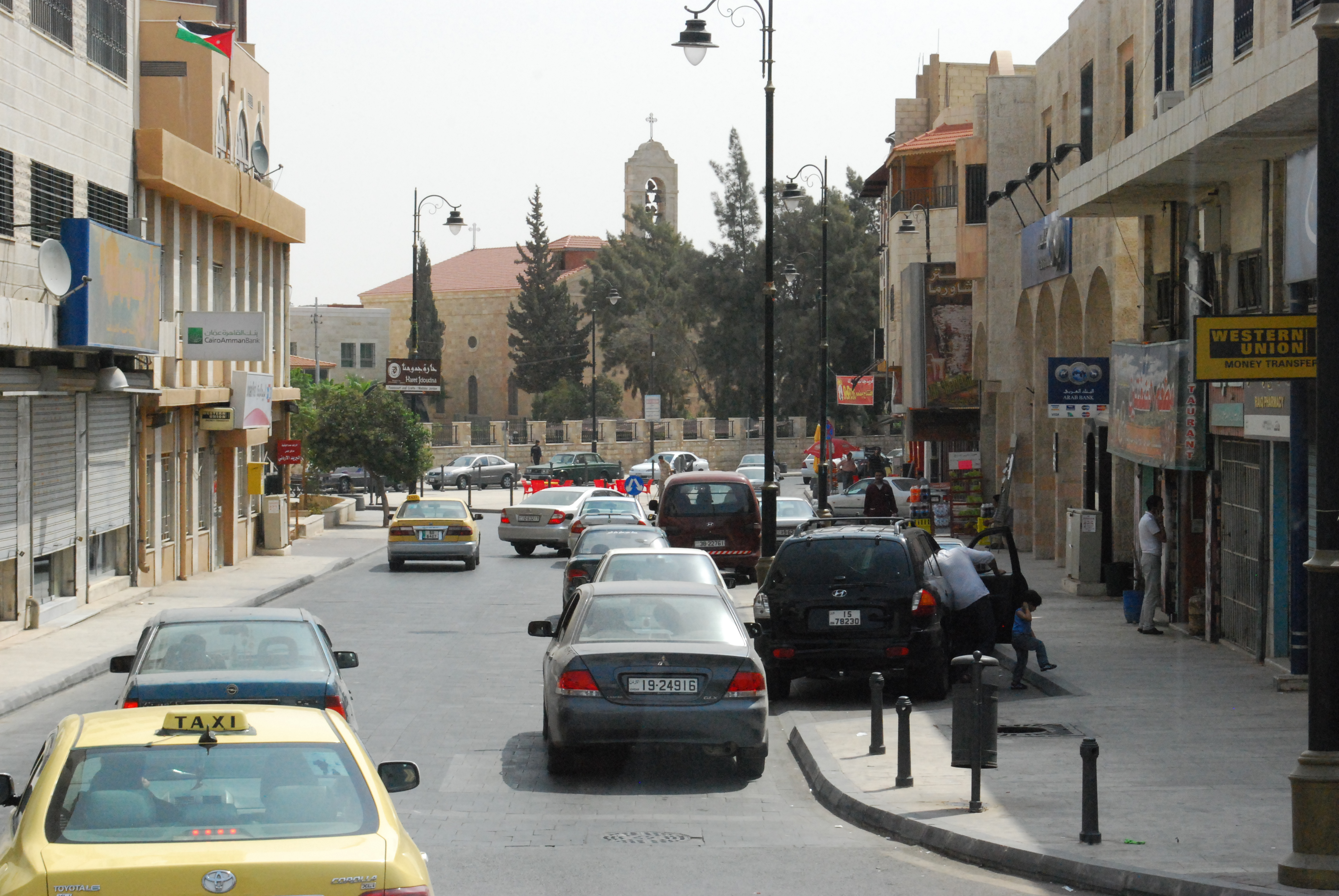 Madaba : rue vers l'église Saint-Georges.